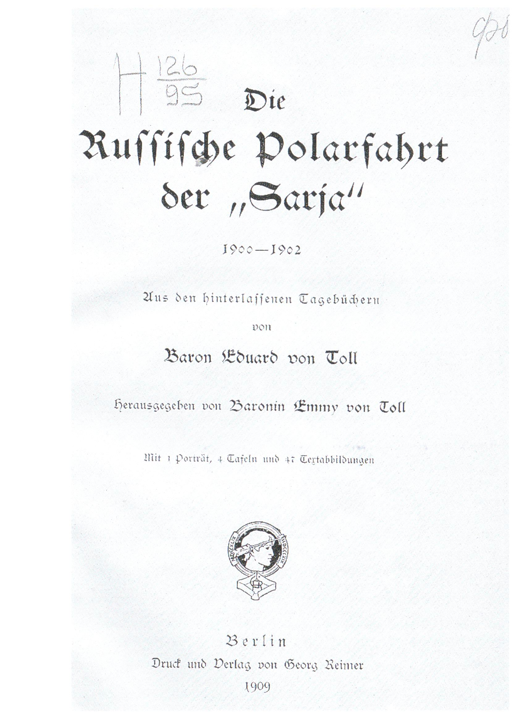 Титульный лист 1-го издания книги Э.В. Толля о Русской полярной экспедиции